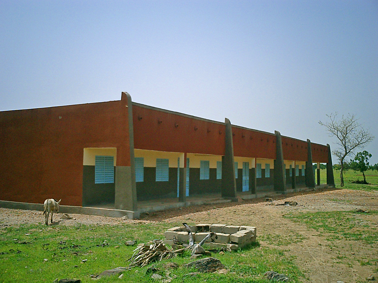 Burkina Faso: collège im Bau (2004)